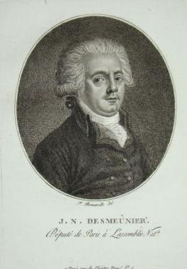 Jean-Nicolas Démeunier (1751-1814), depute de Paris a L'Assemblee Natle